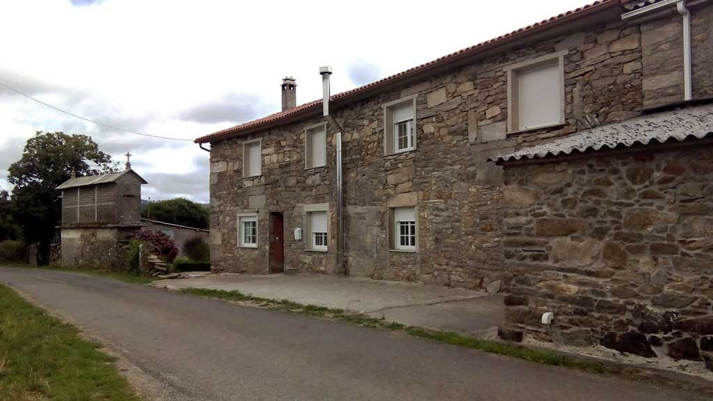 Vista de Castelo, Curtis.